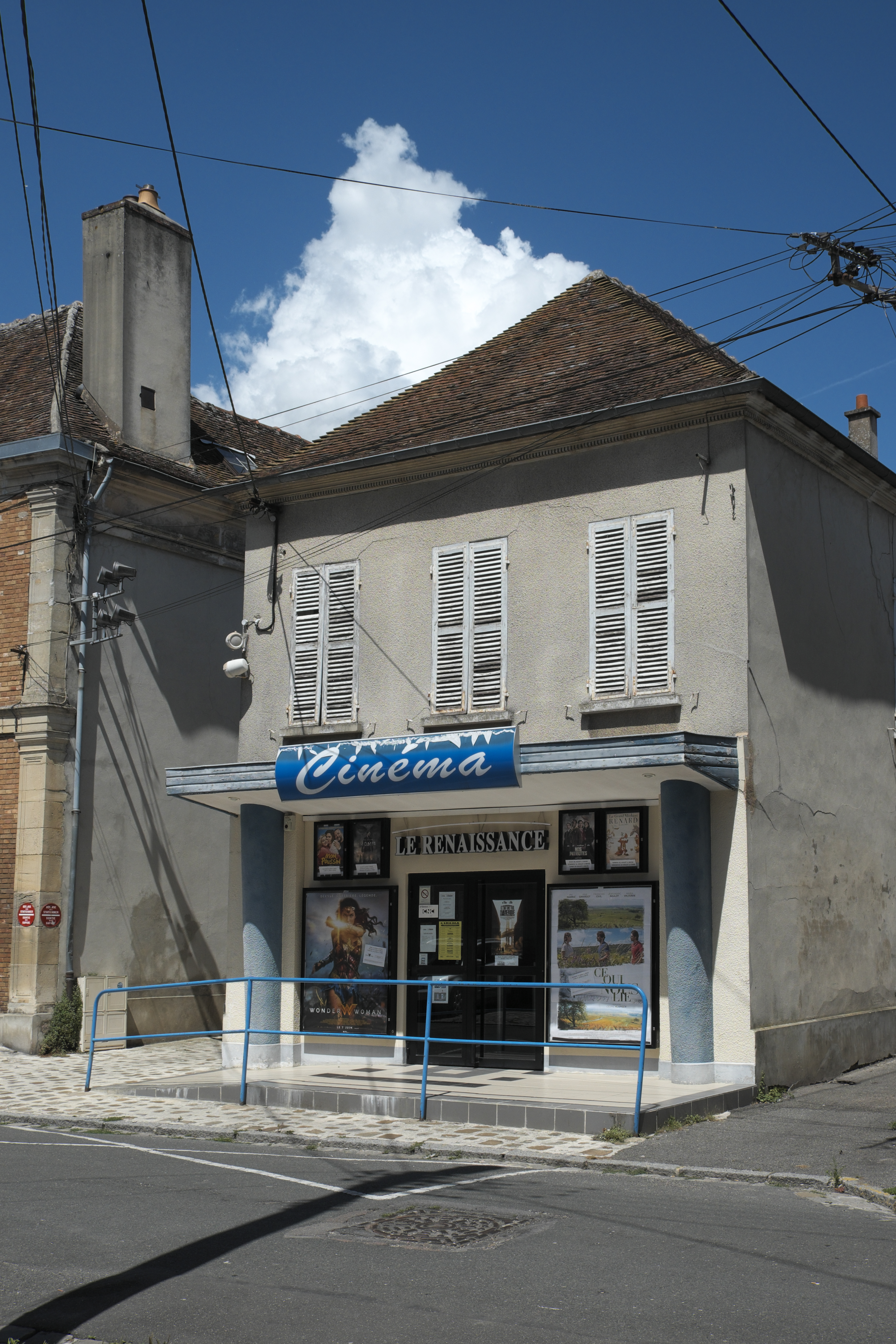 Kino in Bray-sur-Seine im Département Seine-et-Marne (Île-de-France/Frankreich)